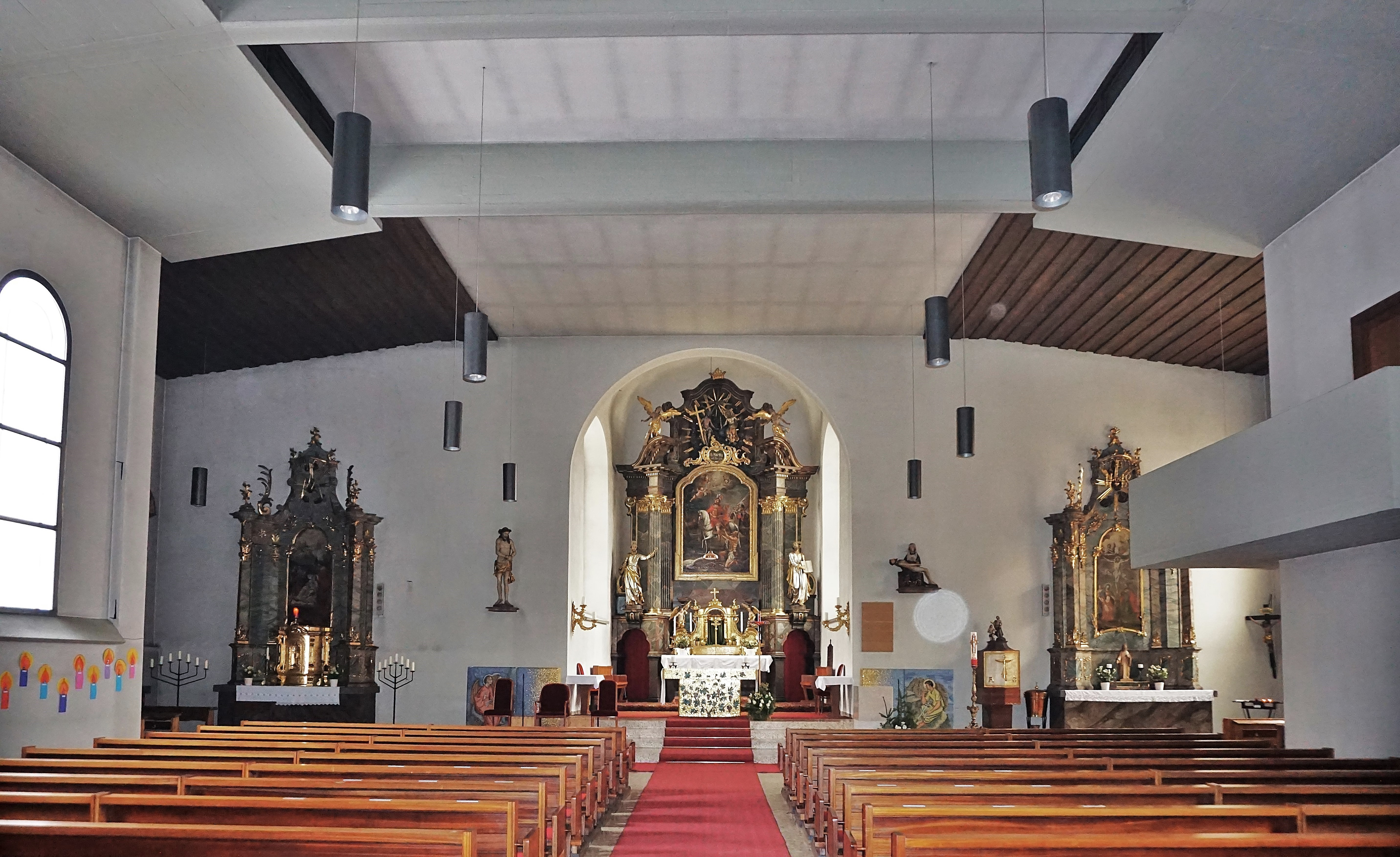 Kath. Pfarrkirche St. Martin (Villach), Innenansicht